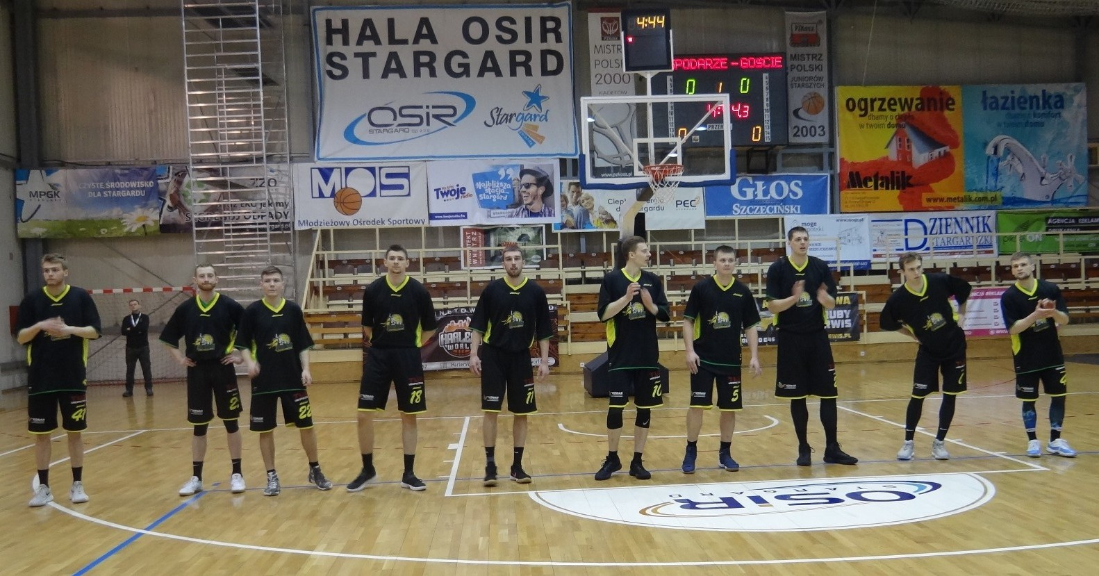 Koszykarze Siarki Tarnobrzeg przed meczem ze Spójnią